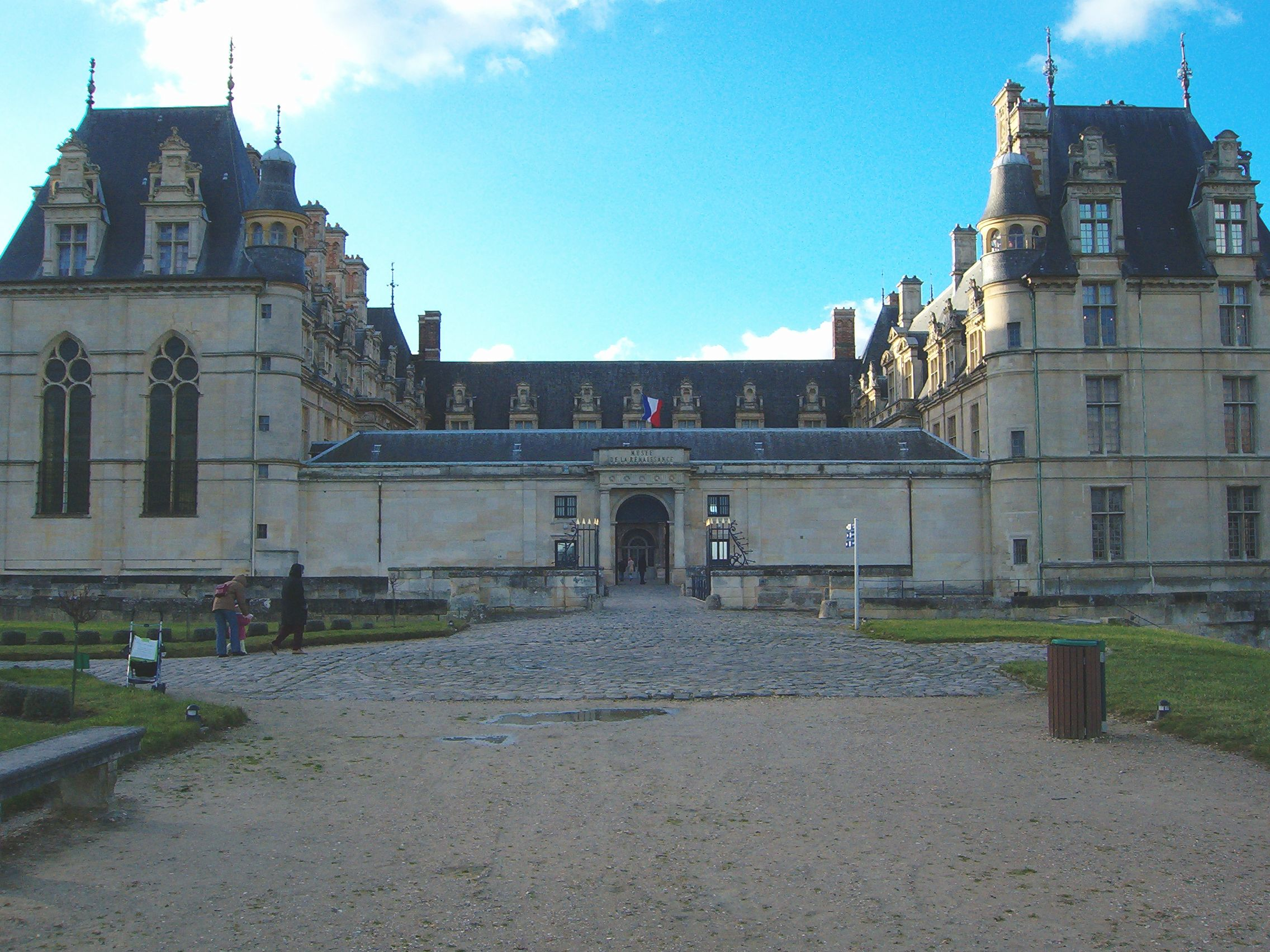 Chateau d'Ecouen